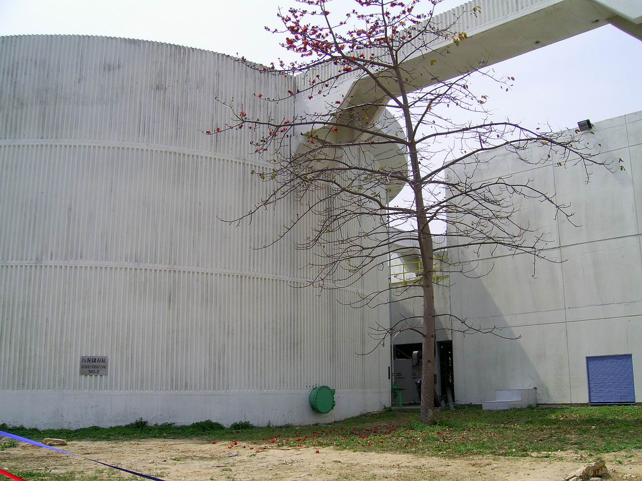 沙田污水處理廠污泥儲存缸